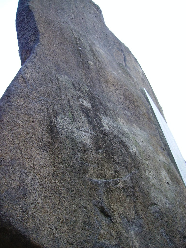 臺北市中山區圓山遺址的圓山大砥石。 Bân-lâm-gú: Tâi-pak-tshī Tiong-san-khu Înn-suann uî-tsí ê Înn-suann Tuā-té-tsio̍h.